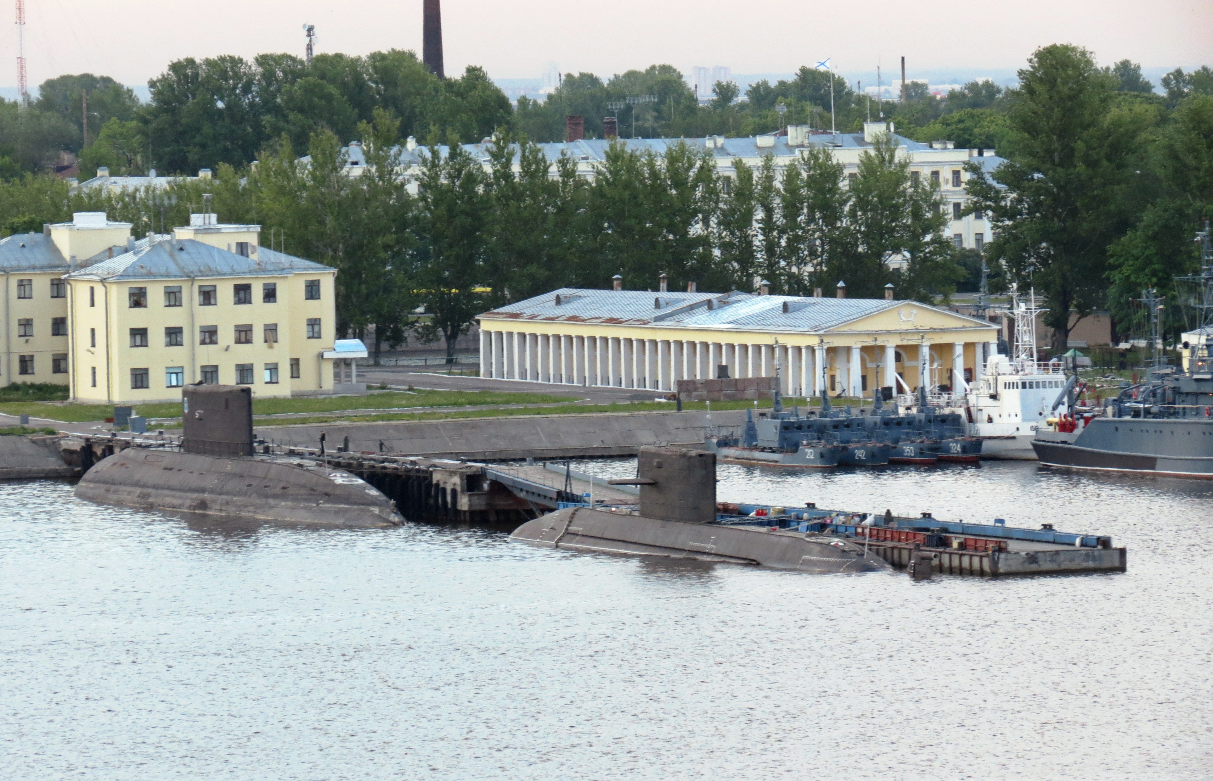 Кронштадт. Причалы.